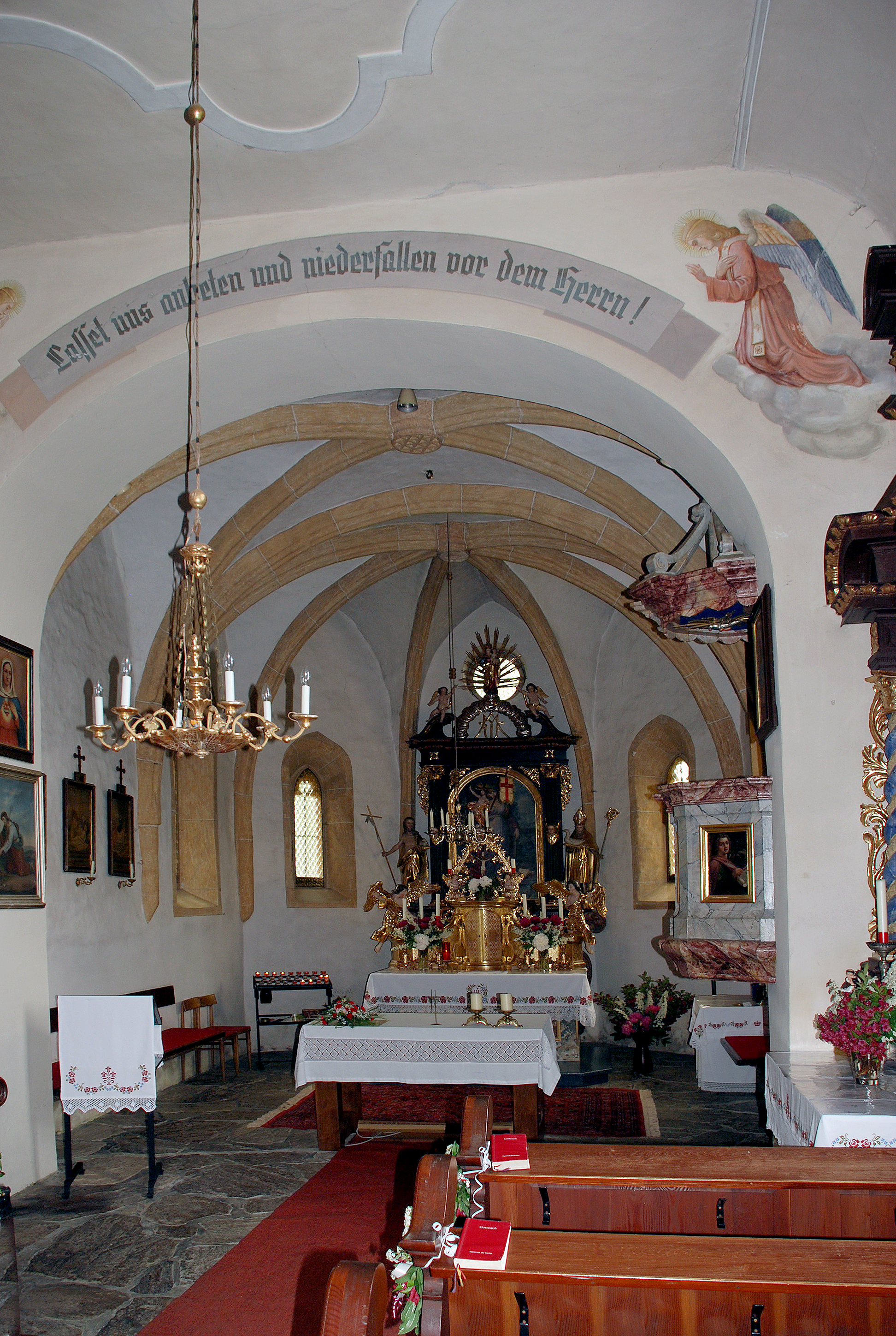 Wielfresen, Steiermark, Österreich: Pfarrkirche St. Katharina Hochaltar